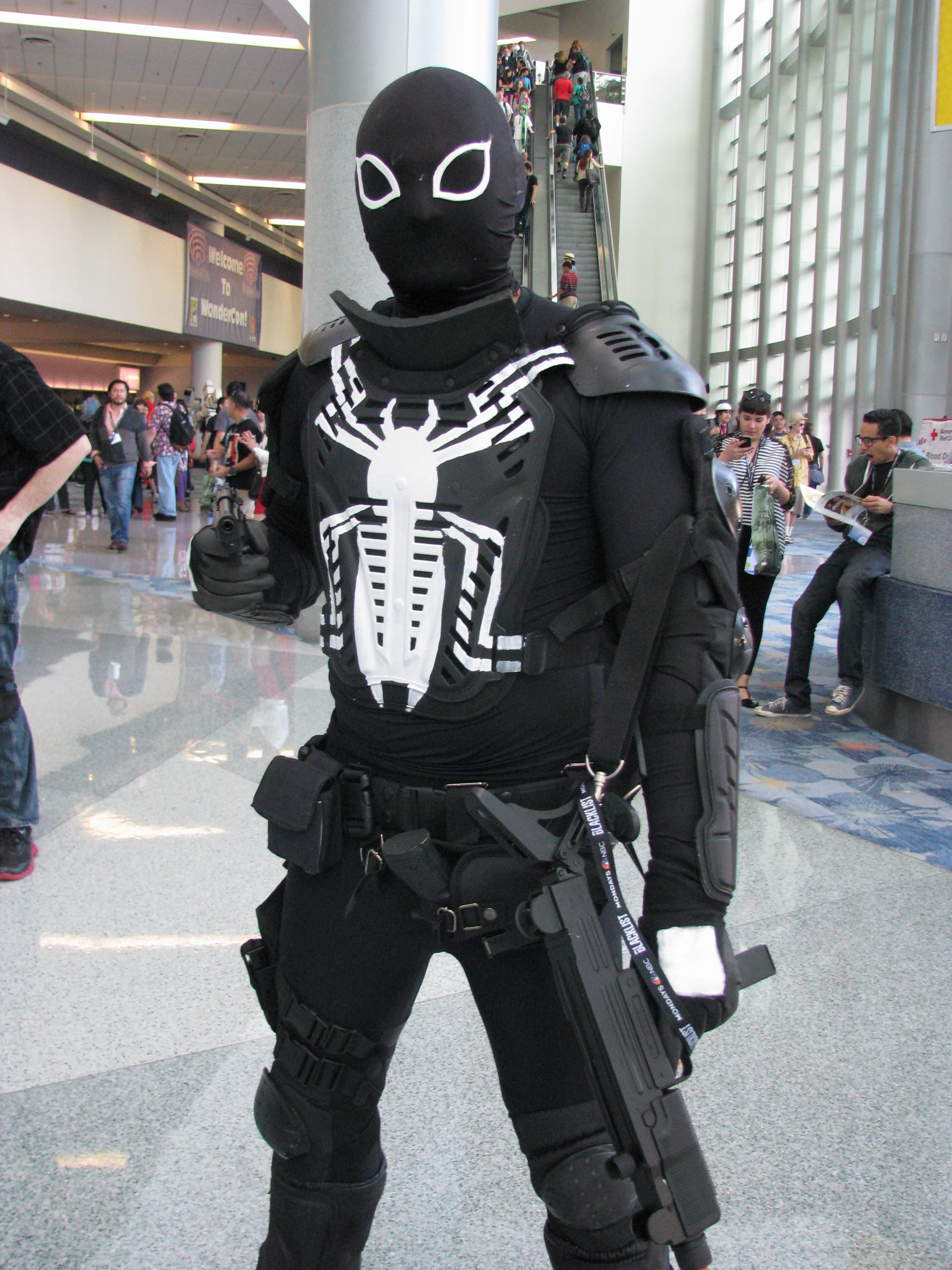 WonderCon 2014 - Agent Venom Cosplay